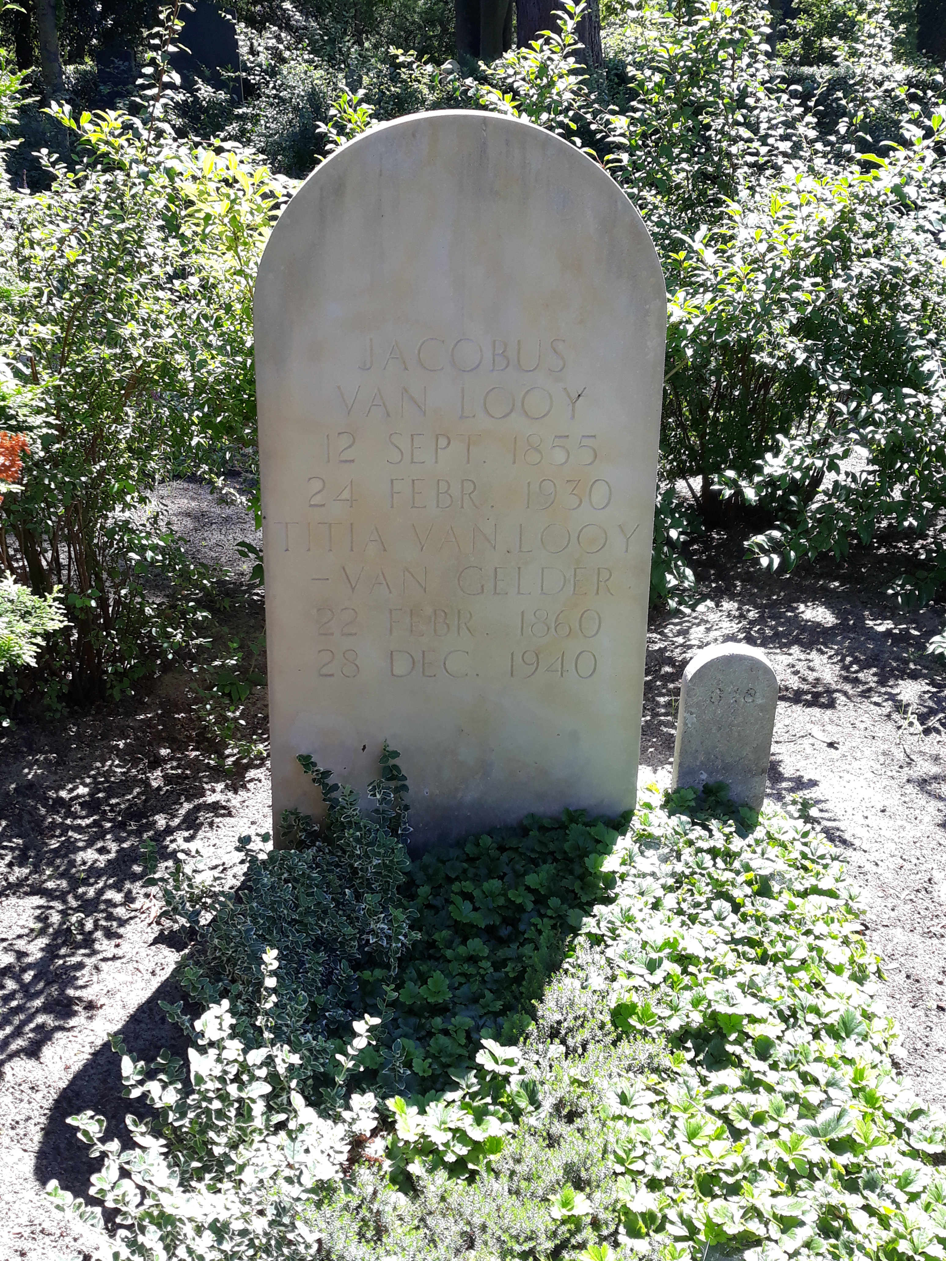 Das Grab des niederländischen Malers Jacobus van Looy und seiner Ehefrau Titia auf dem Friedhof Kleverlaan in Haarlem.